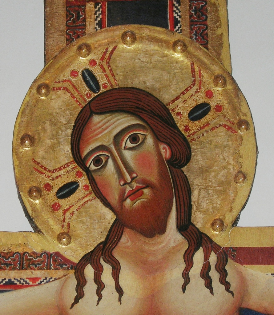 Crusifix